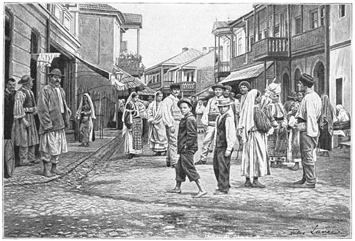 "Het stadje Horezu"